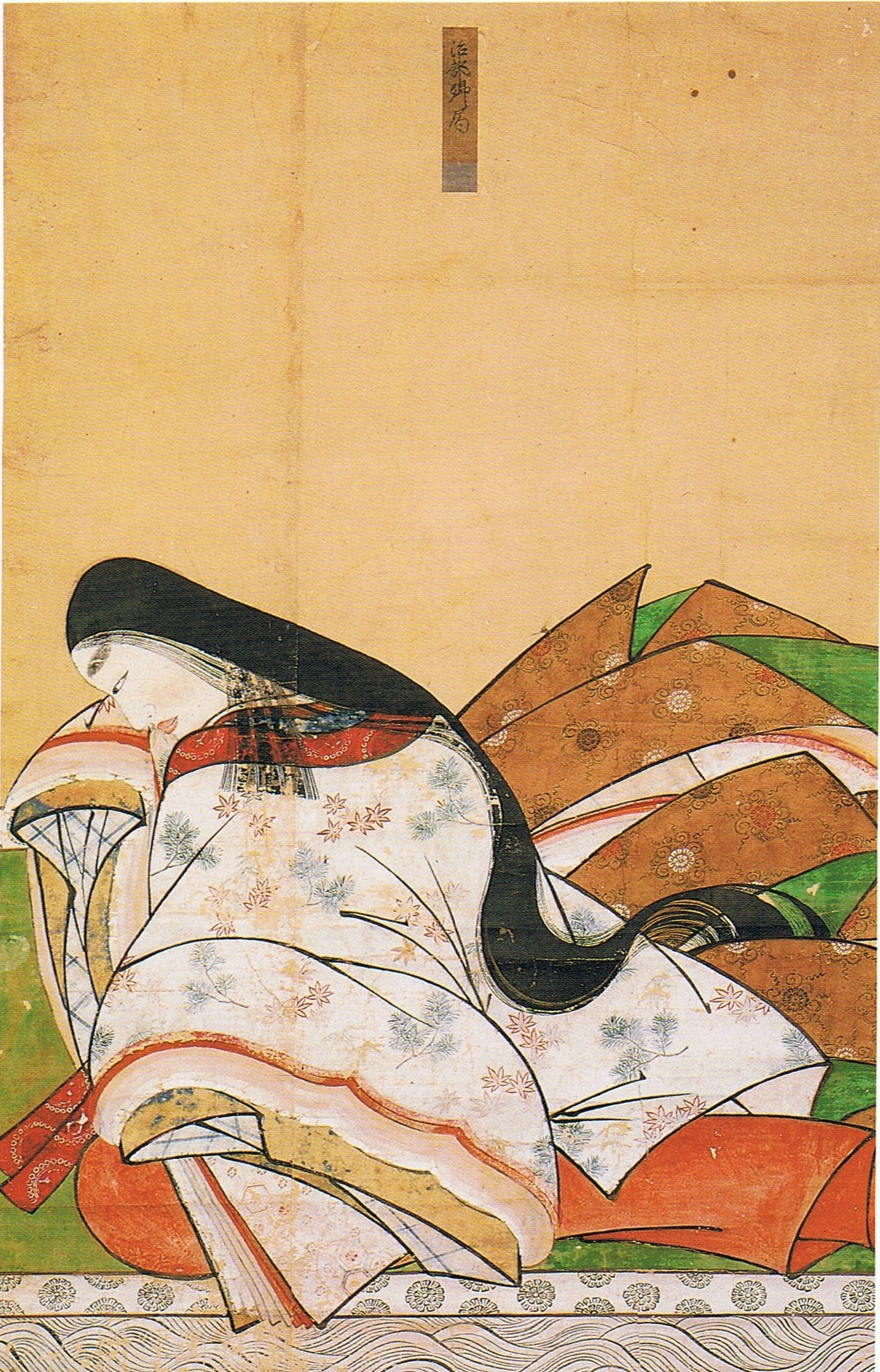 治部卿局画像（平知盛妻）